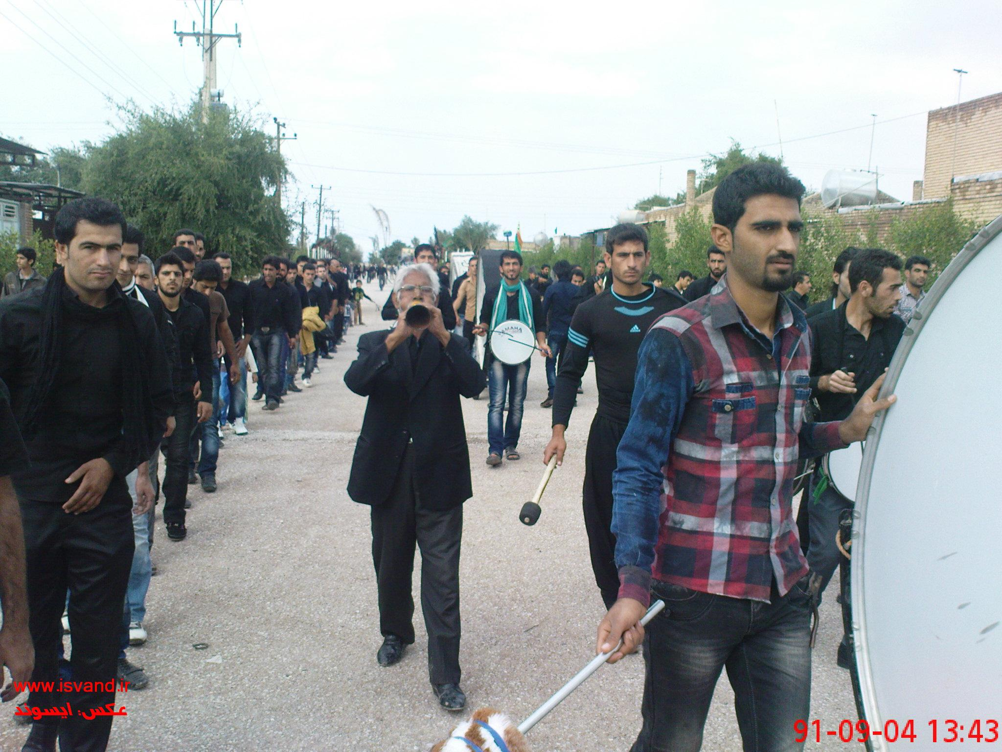 محرم 91 شلگهی